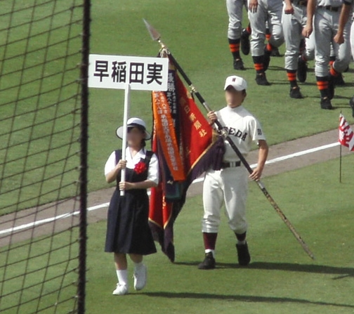 Waseda Hanshin_Koshien_Stadium 第89回全国高等学校野球選手権大会。優勝旗返還の為、甲子園の開会式・入場行進に参加する2006年度優勝校・早実ナイン